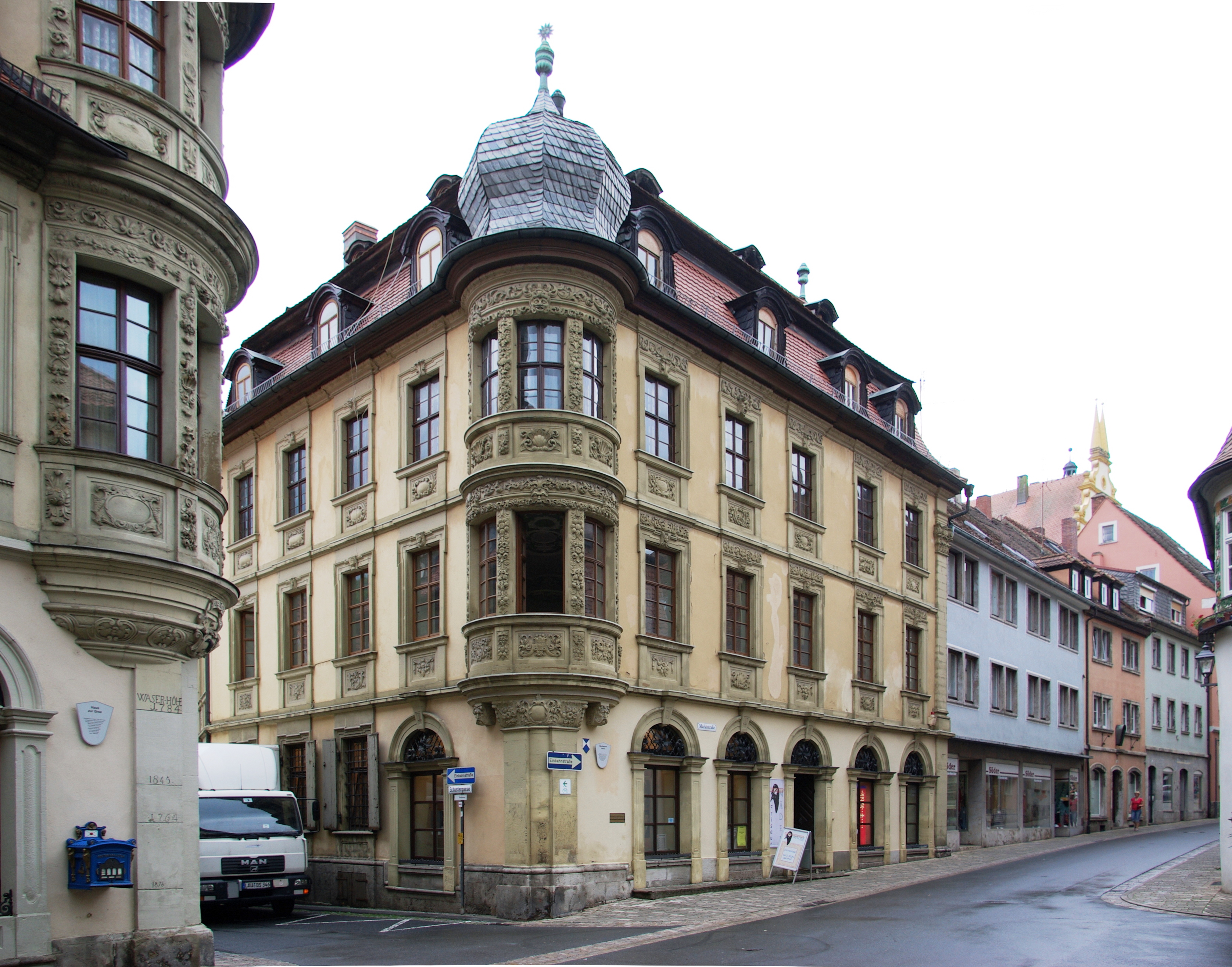 Marktbreit, Wertheimer Haus, Schustergasse 2